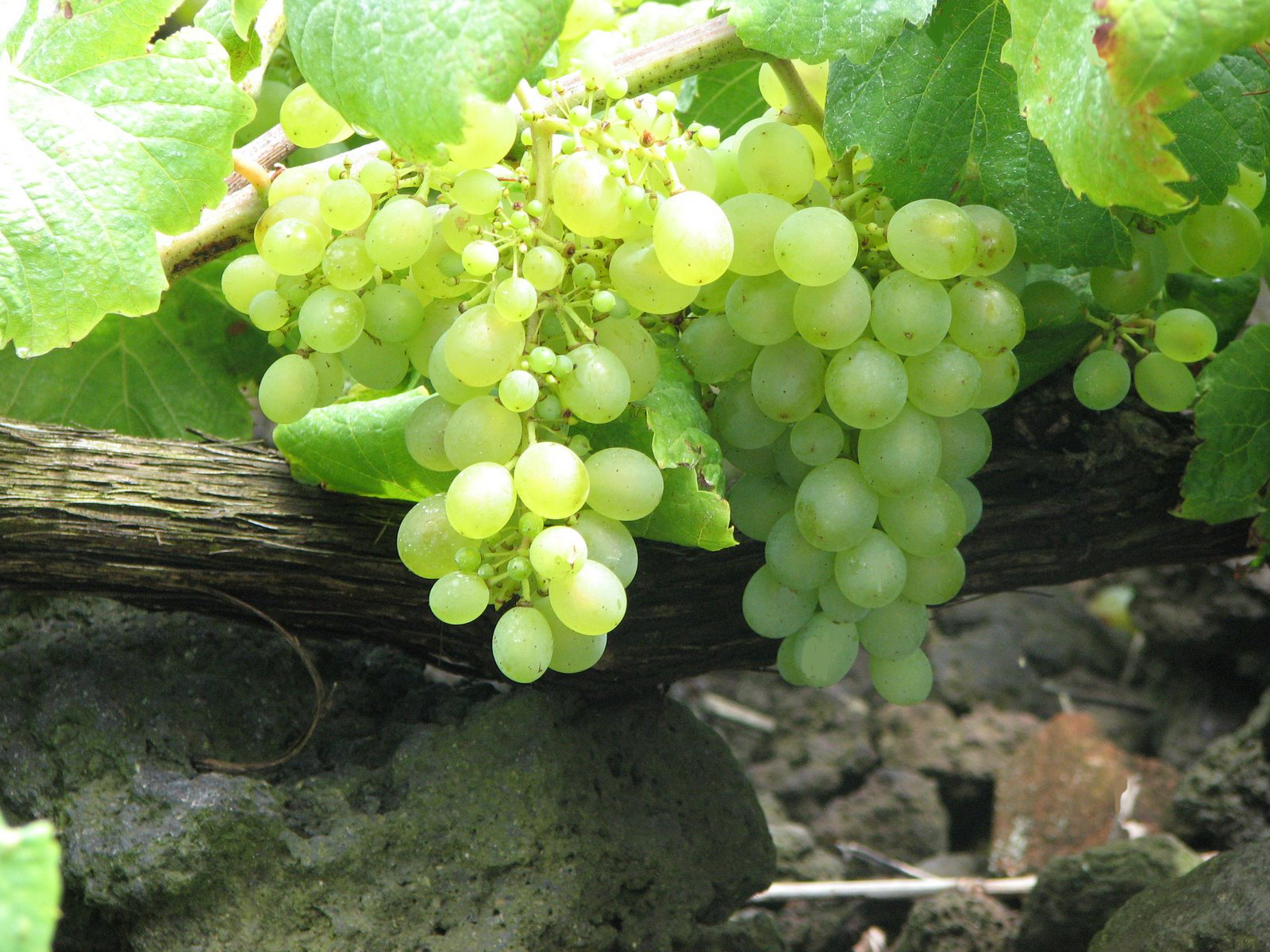 Cacho de uvas da Casta Verdelho.